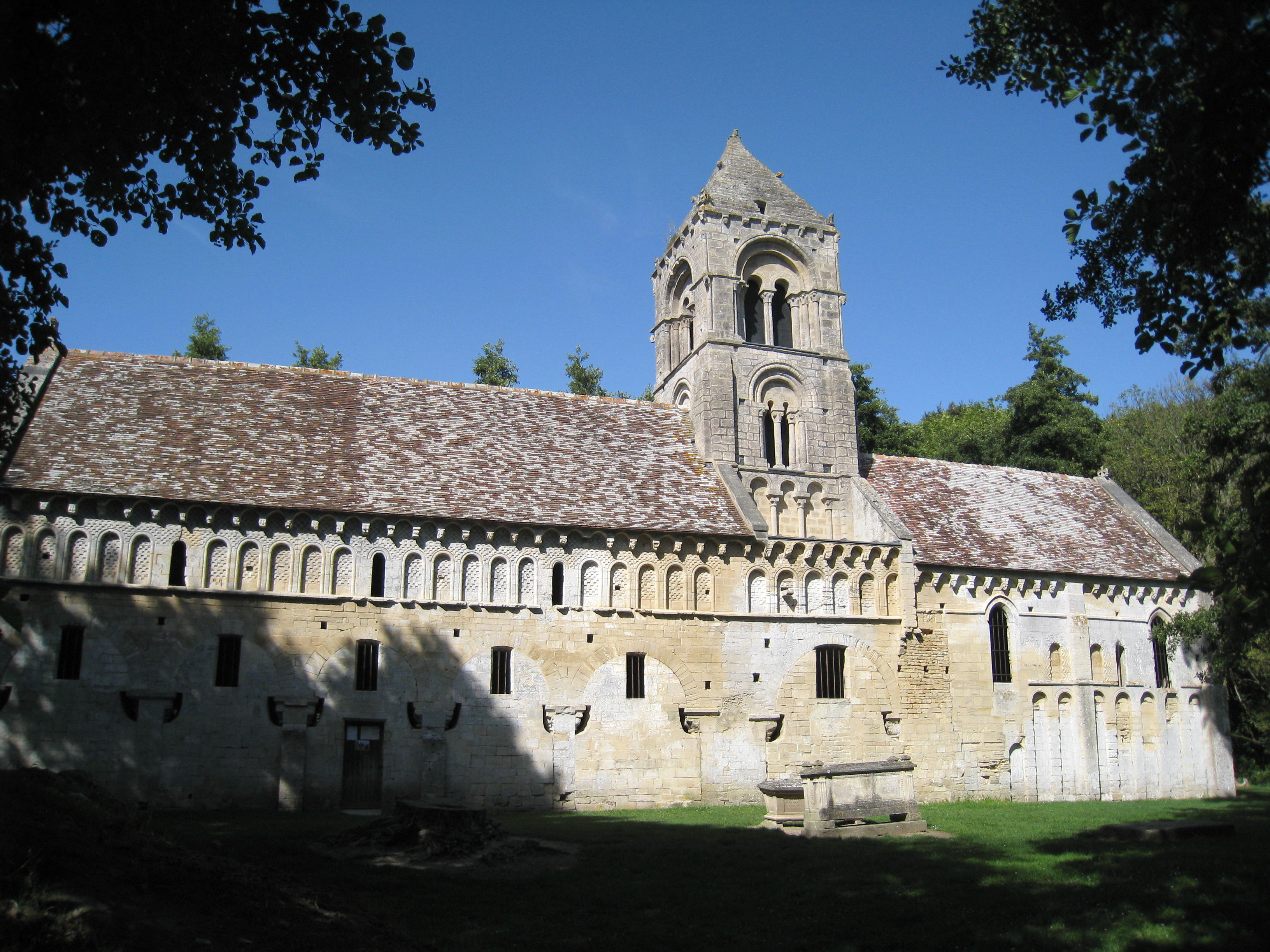 Ancienne église Saint-Pierre à Thaon, Calvados, Basse-Normandie, France